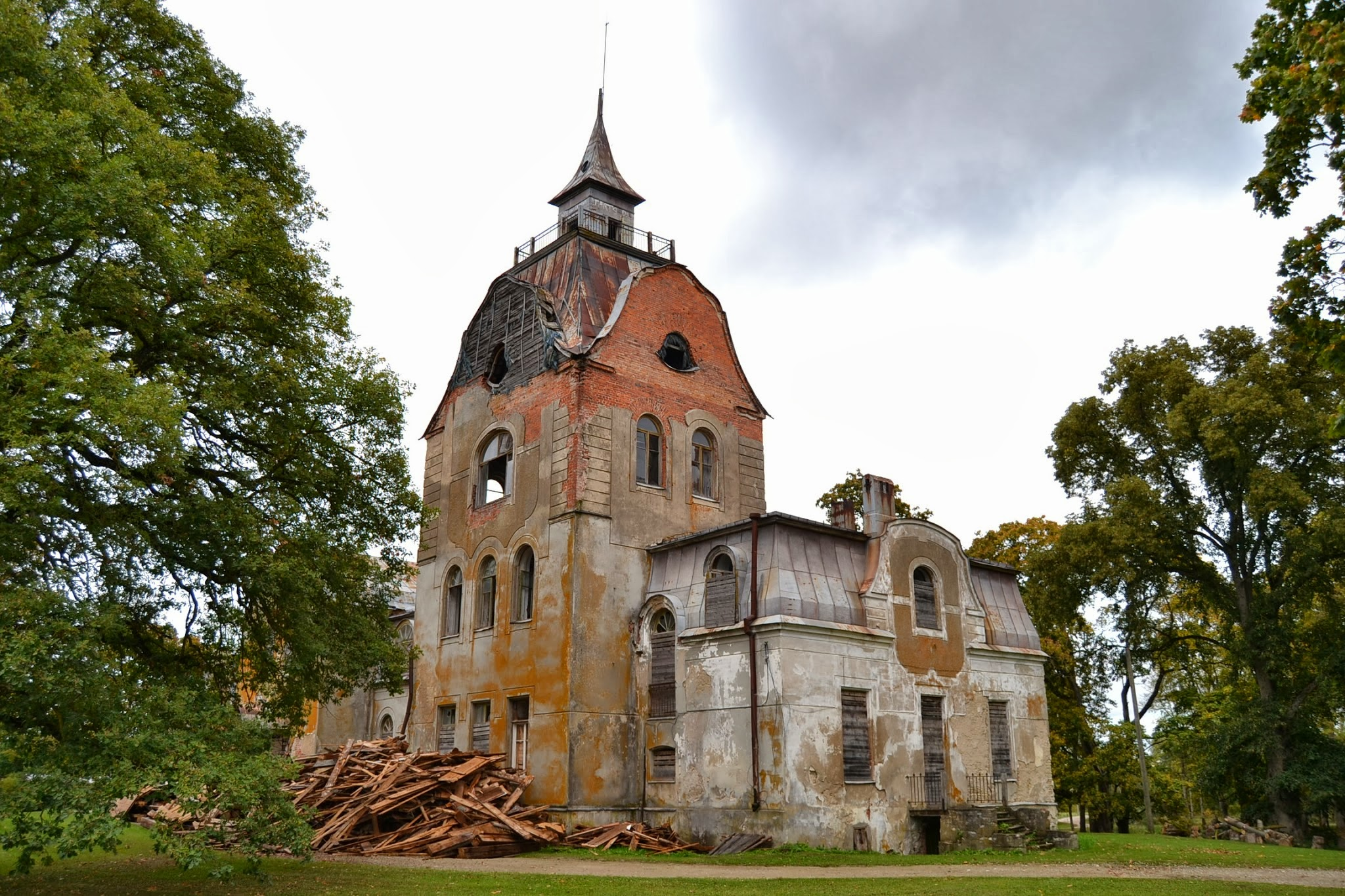 Neeruti mõisa peahoone